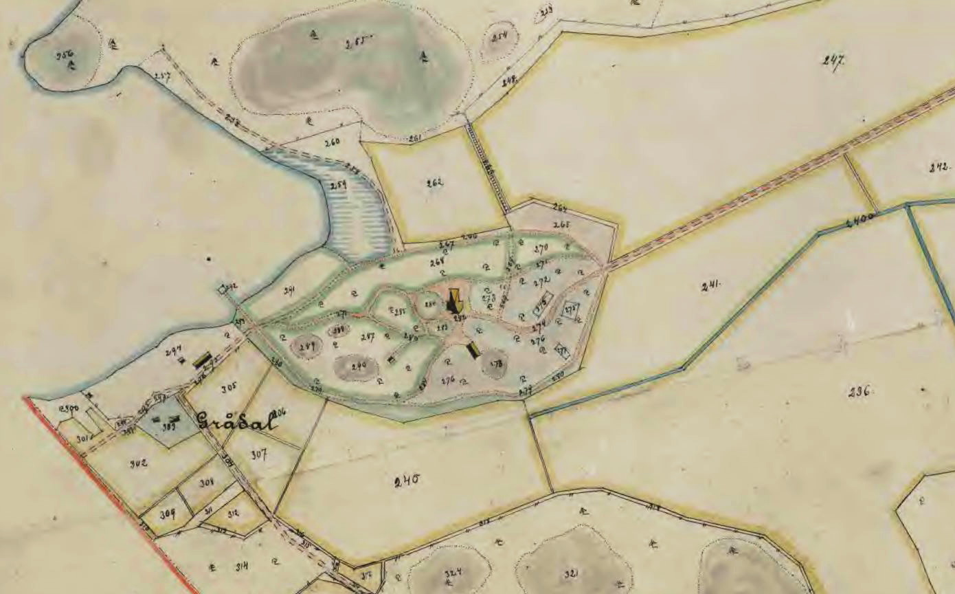 Del av karta över Sturehovs ägor visande Sillvik